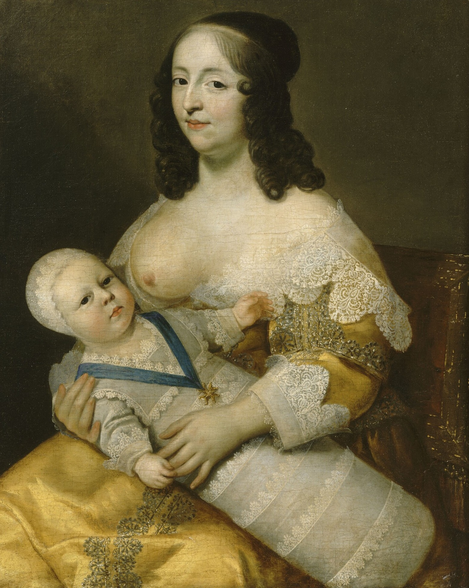 Louis XIV et sa nourrice, dame Longuet de La Giraudière. Premier portait connu de Louis XIV, alors âgé de quelques mois dans les bras de sa nourrice, Élisabeth Ancel, dame de La Giraudière.